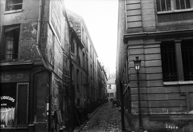 Passage Saint-Sabin, Paris 11e, en 1913. Entrée au 31 rue de la Roquette.